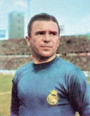 Ferenc Puskas en 1965 - Campioni dello Sport 1966-1967, n°173